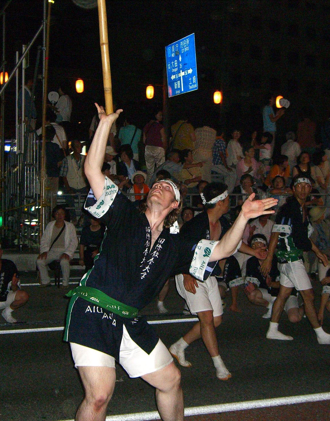 Matsuri in Akita